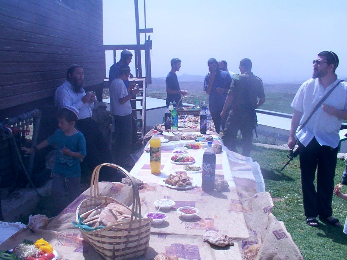 חוות סקאלי באלון מורה